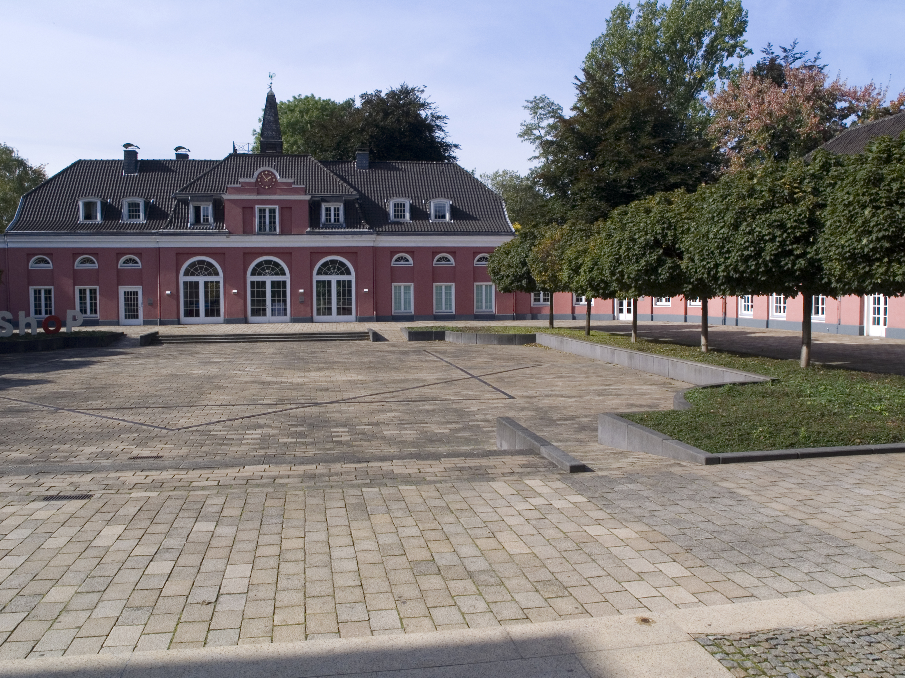 Северный Рейн-Вестфалия, Оберхаузен - замок Оберхаузен